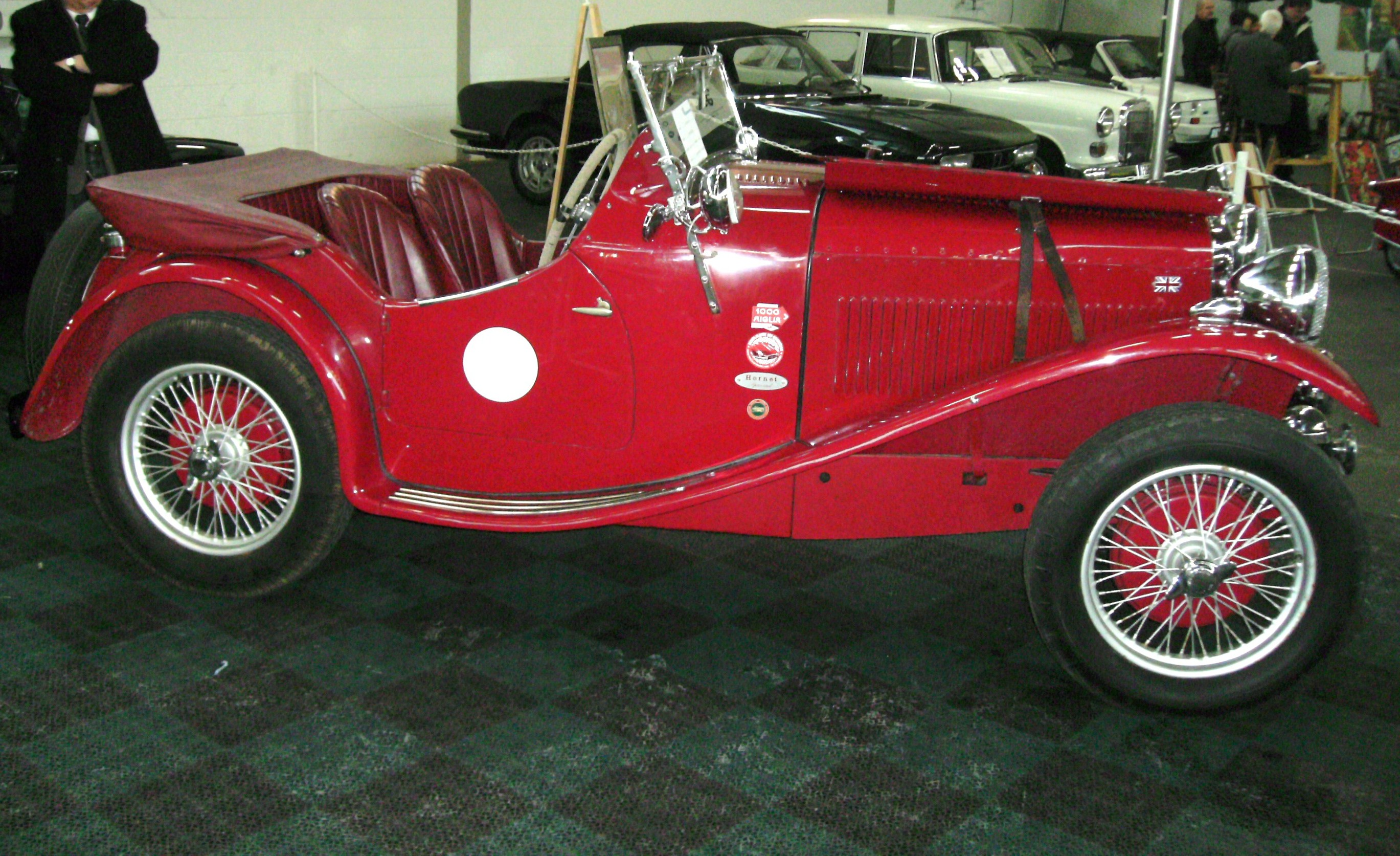 Wolseley Hornet-Saloon (Bj 1932, 6-Zylinder, 55PS, Hubraum 1300 cm³0